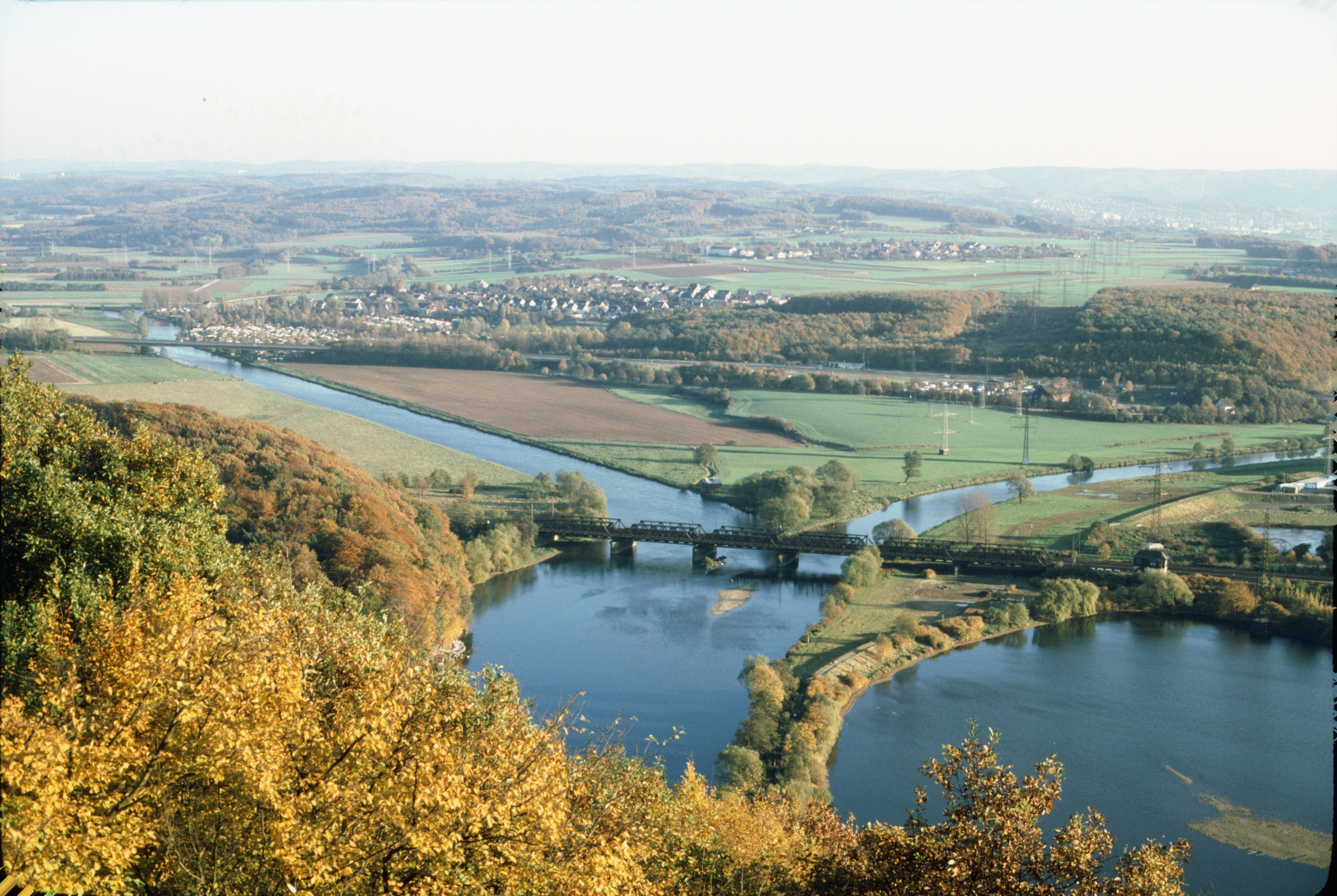 Blick vom Syberg in Dortmund nach Südosten (Richtung Stadtgebiet Hagen) über die Mündung der Lenne in die Ruhr (mit Eisenbahnbrücke) sowie das Ostbecken des Hengsteysees (rechts)